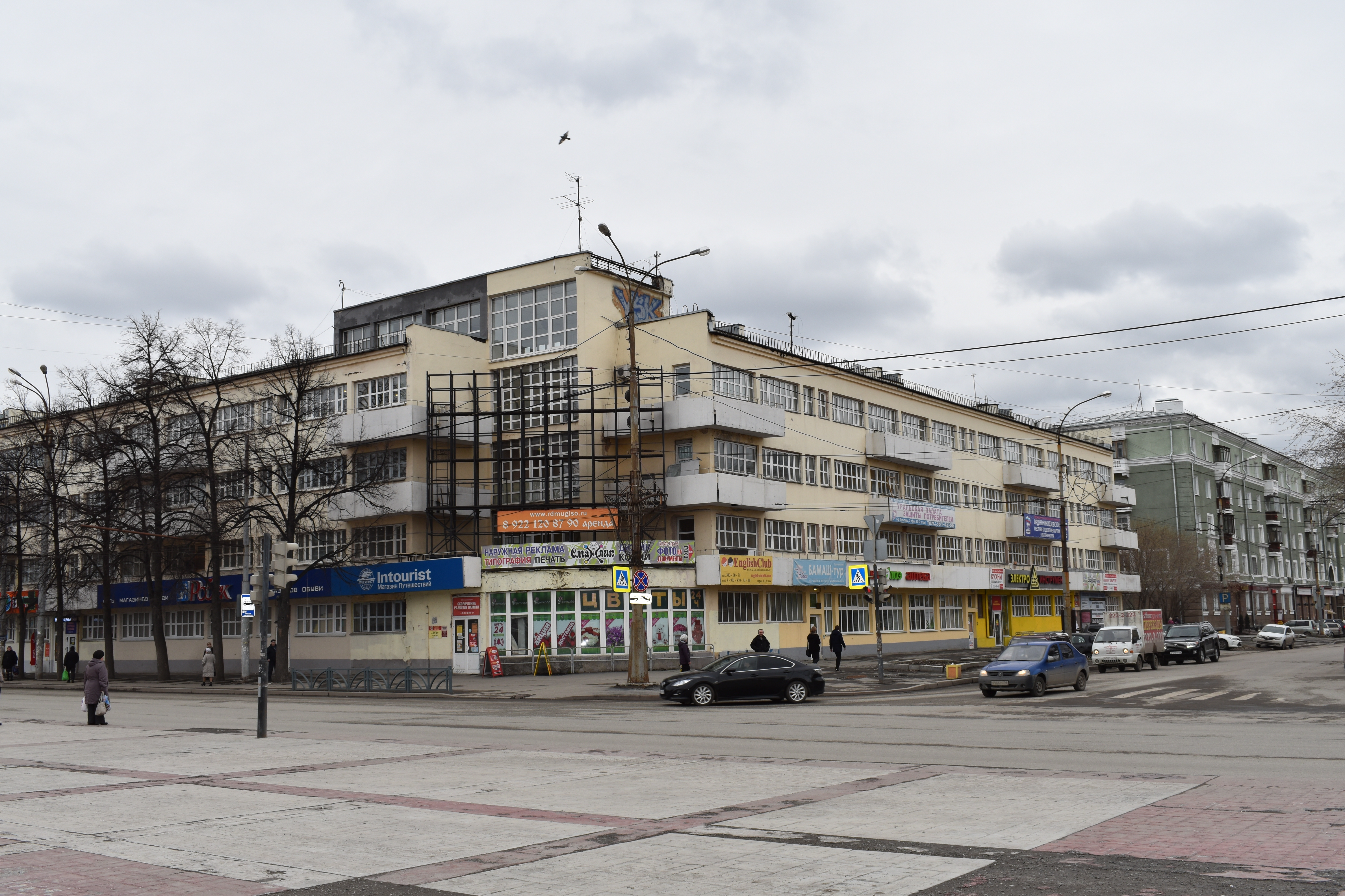 Здание по адресу проспект Орджоникидзе, 1 (Дом техучёбы), строилось с 1930 по 1932 год